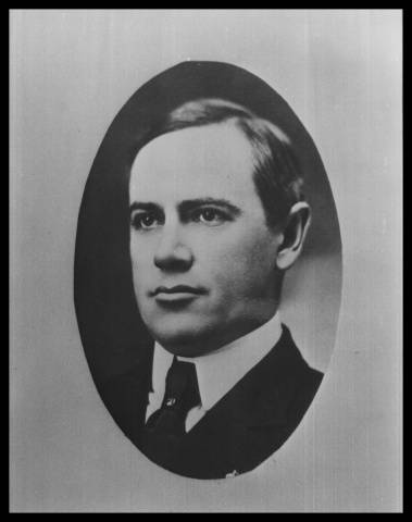 Image taken from